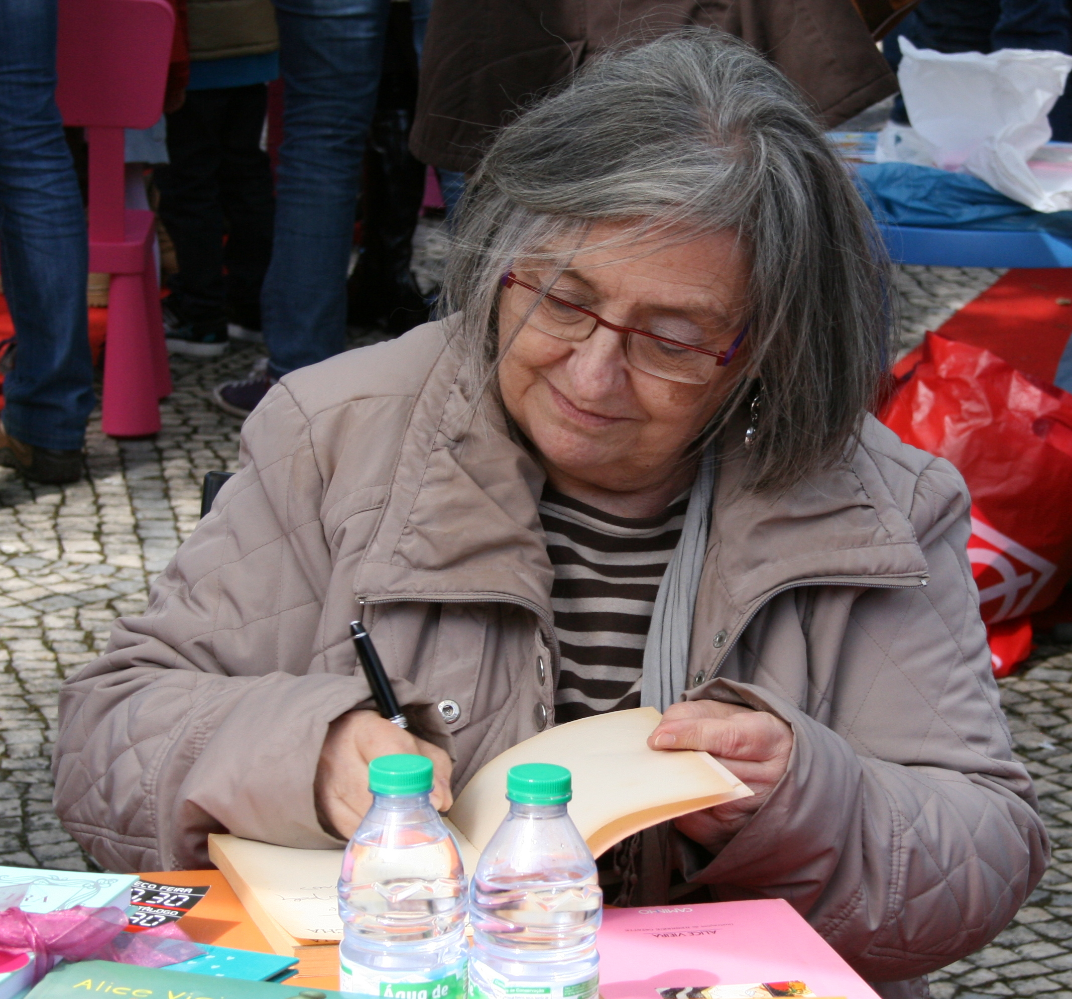 Alice Vieira autografando livros na Feira do Livro de Lisboa de 2012